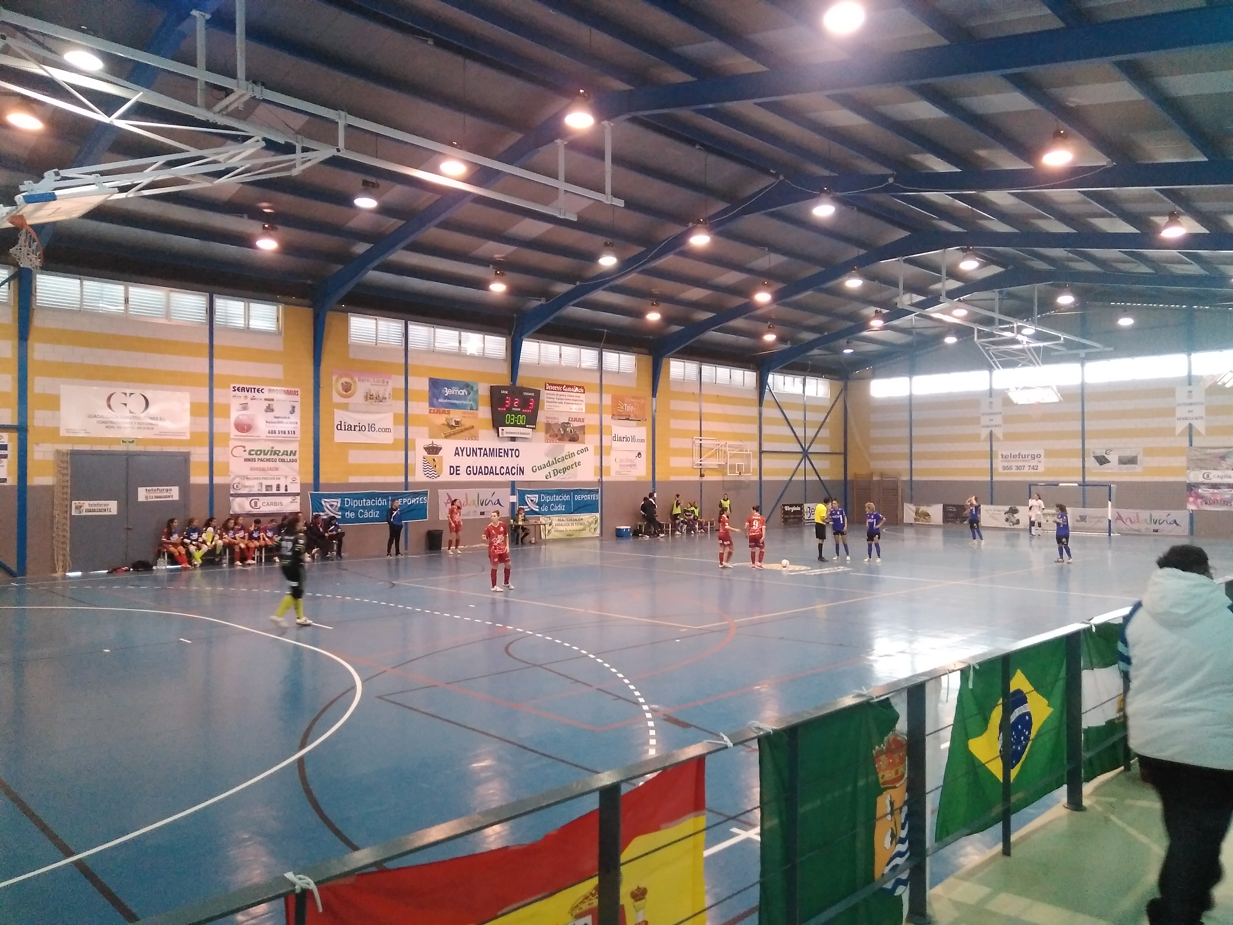 Dieciseisavos de Final de la Copa de Fútbol Sala de la Reina entre Ucam-ElPozo Murcia Fútbol Sala Femenino y Guadalcacin FSF Pabellón Municipal de Guadalcacín